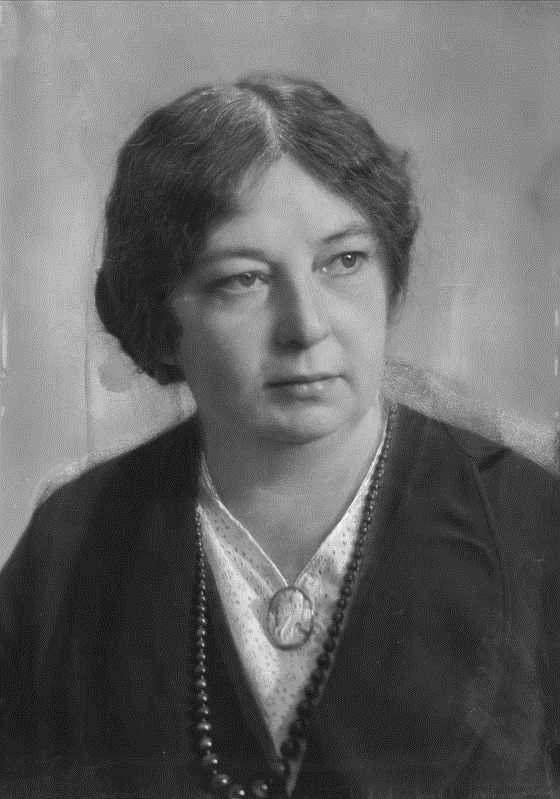 Sigrid Undset, portrett, kvinne, forfatterinne, brystbilde.